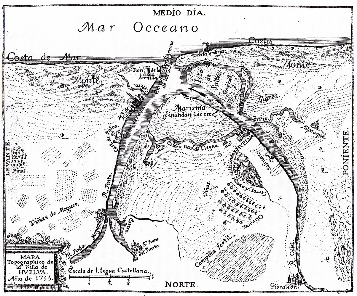 Mapa Topográfico de Huelva y los Lugares colombinos, del siglo XVIII. Spain.